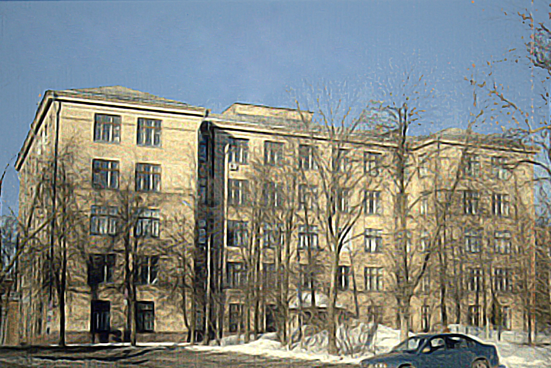 Здание ОАО ГИПРОИВ